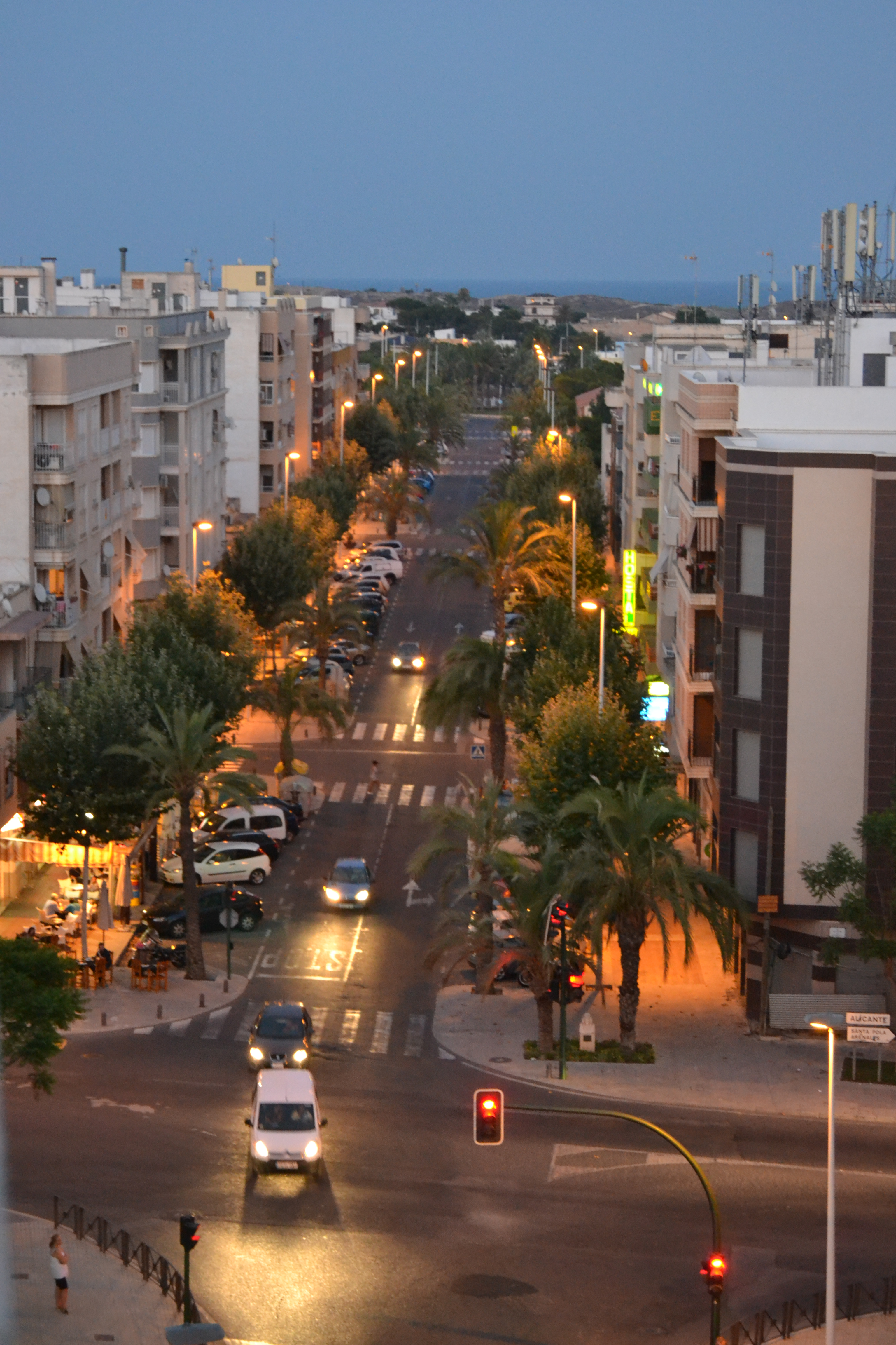 Esta foto está tomada desde la terraza de mi edificio en El Altet. En ella se contempla la avenida Dama de Elche desde su inicio en el cruce con la N-332 Hasta su final, al fondo, en la plaza del Pais Valenciano